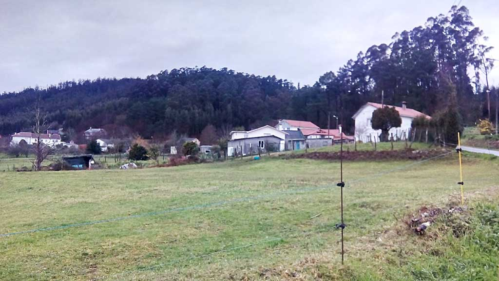 Vista do Cotelo, Pedroso, Narón.